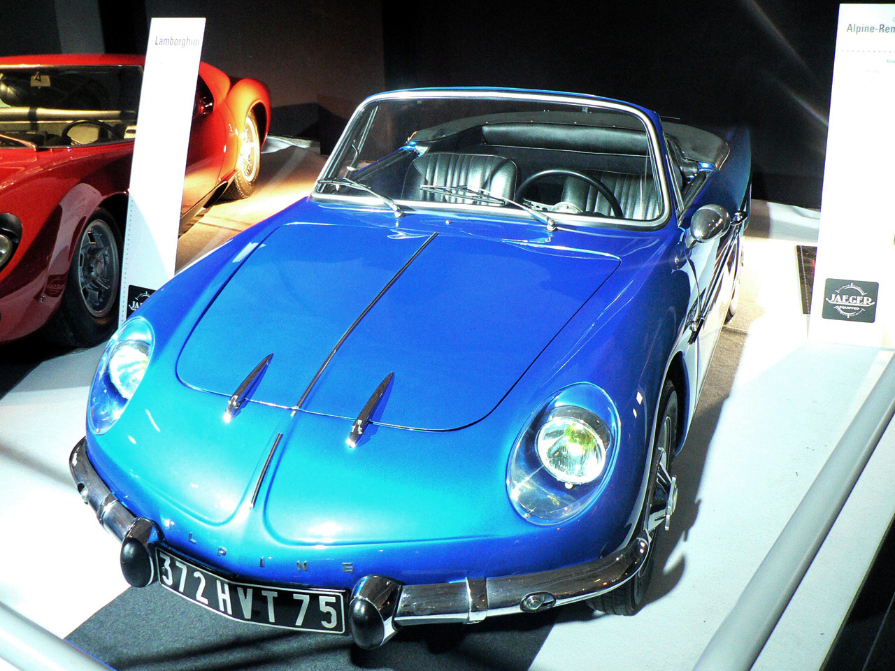 Alpine A108 Cbriolet. Mondial de l automobile de Paris (October 2006).